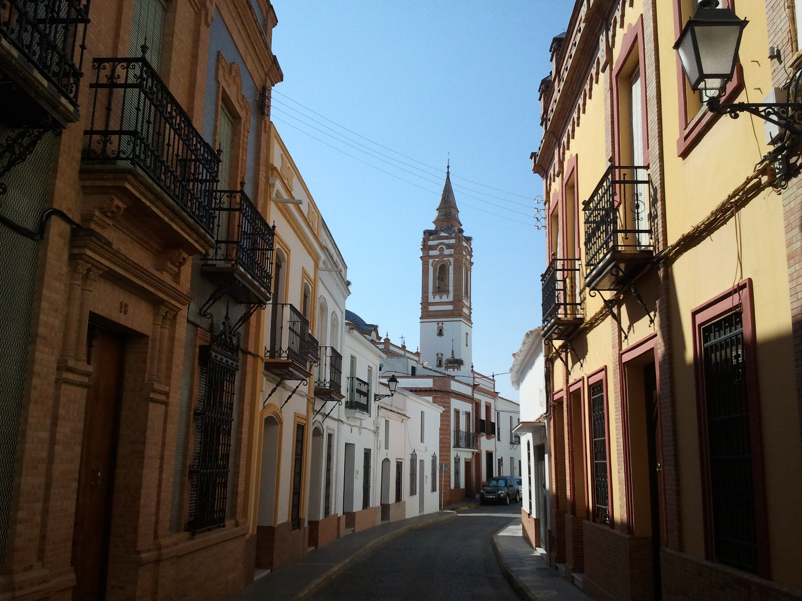 Calle Amargura de Rociana del Condado (Huelva), localidad declarada Conjunto Histórico-Artístico y Bien de Interés Cultural.